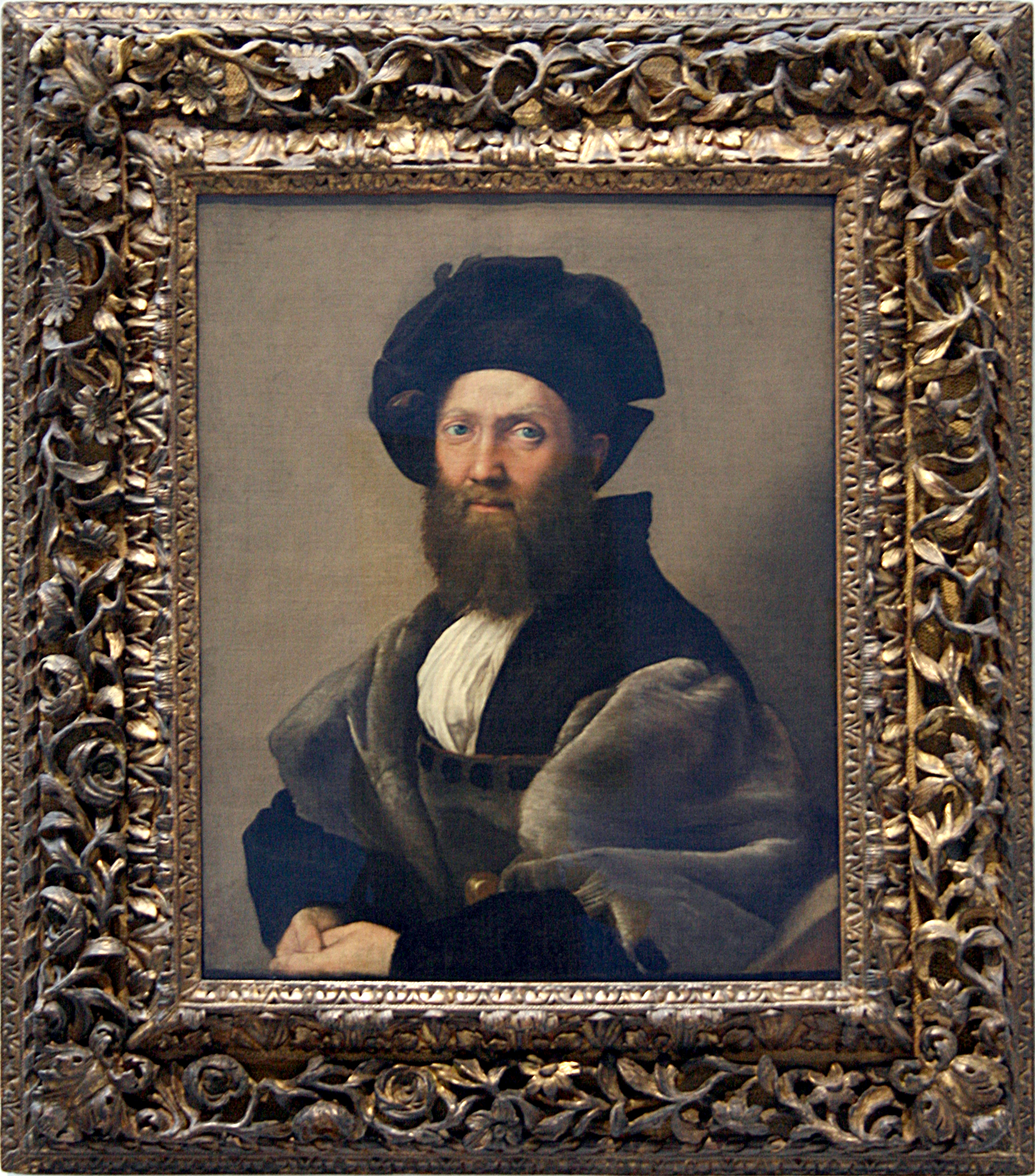 Portrait de Baldassare Castiglione (H : 82 cm ; L : 67 cm), huile sur toile, œuvre réalisée en 1729 par Raffaello Sanzio, appartenant au Louvre (INV 611) et photographiée lors de son exposition dans la Galerie du Temps (4 décembre 2012-3 décembre 2013) au Louvre-Lens (France).